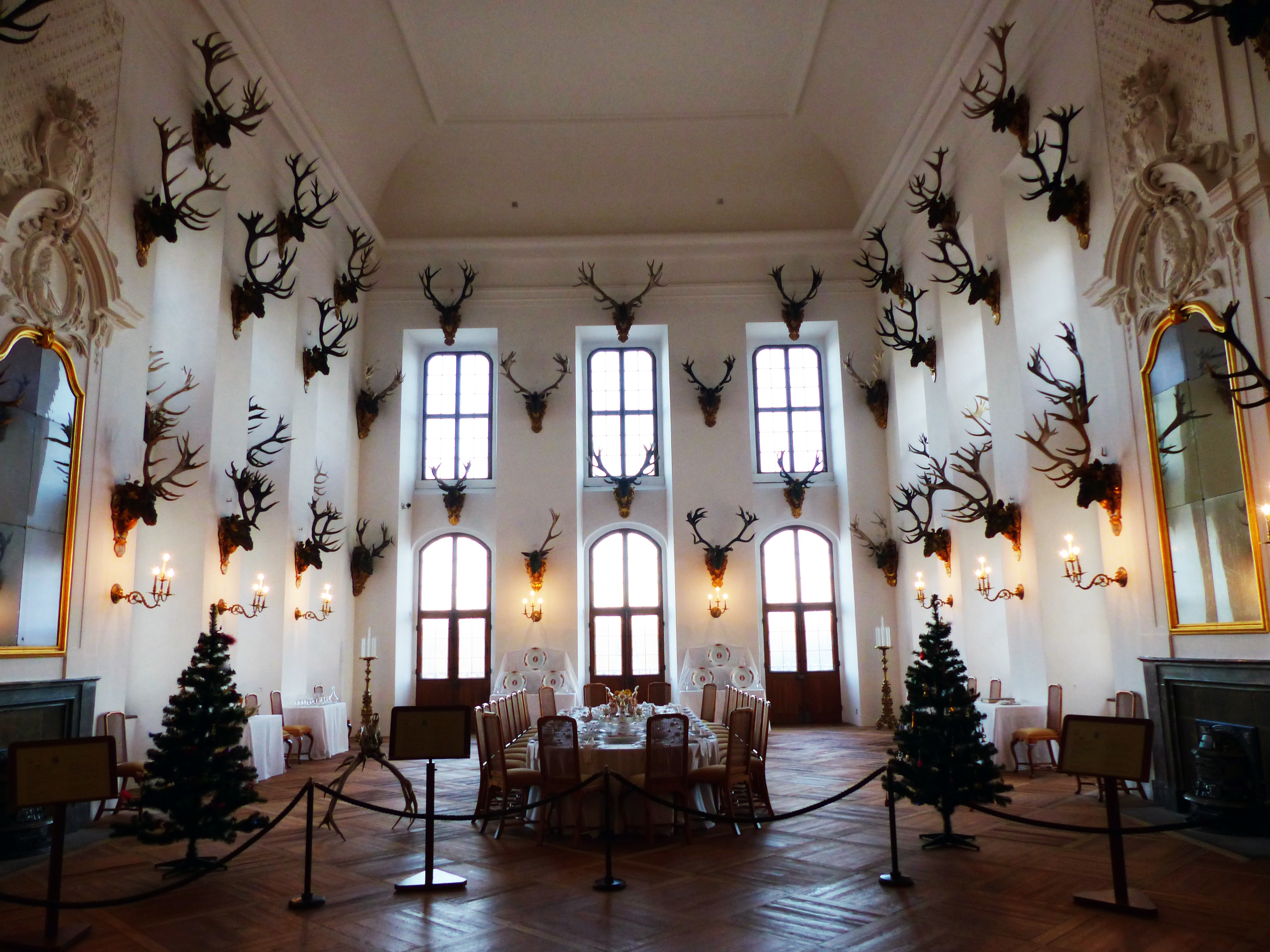 Speisesaal im Schloss Moritzburg zur Weihnachtszeit mit Weihnachtsbäumen